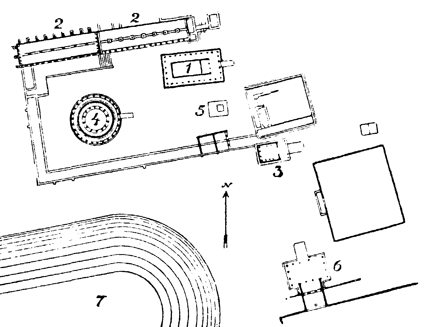 Fig. 1. Plan af helgedomen i Epidauros. 1. Asklepiostemplet. 2. Abaton. 3. Artemistemplet. 4. Tholos. 5. Stora altaret. 6. Propyléer. 7. Kapplöpningsbana.